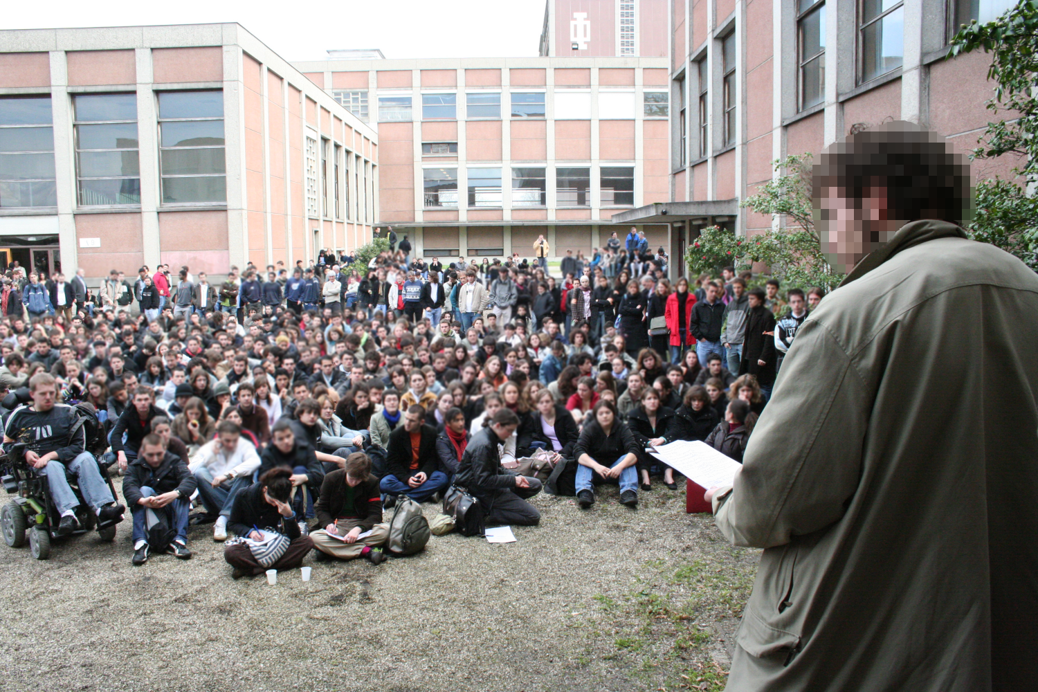 L'Université de Bordeaux 1 au cours du mouvement étudiant anti-CPE.